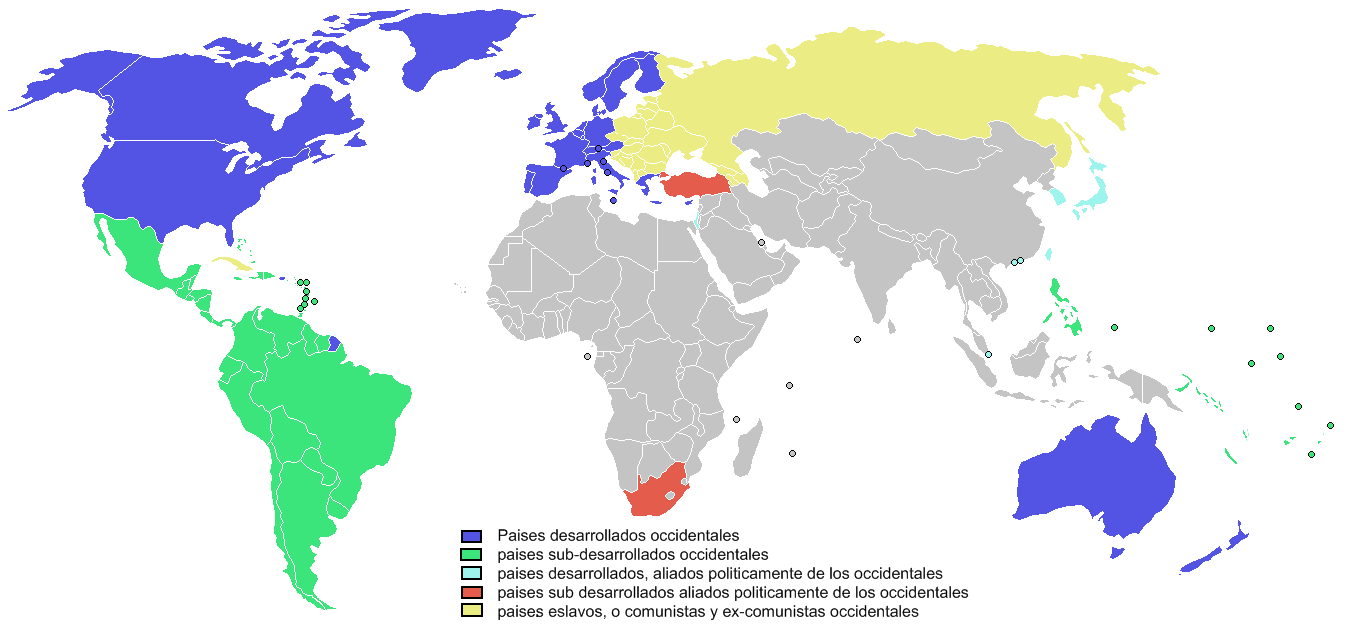 mapa del mundo occidental